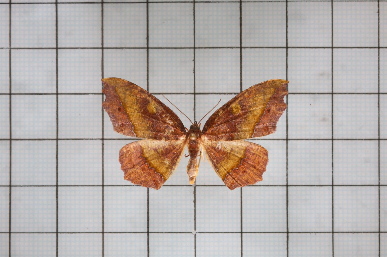 Leptomiza calcearia (Walker, 1860) 紫褐邊尺蛾 鞍1:P.38,Pl.9-12